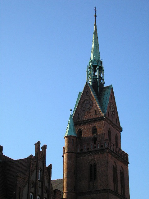 Dieses Bild stellt die Propsteikirche Herz Jesu in Lübeck dar.